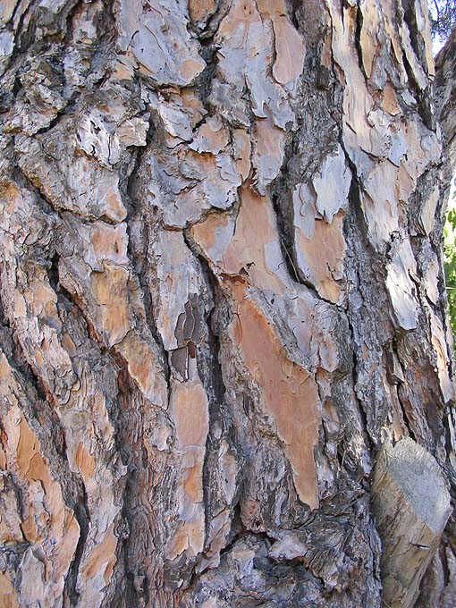 Écorce de Pinus pinea Photo prise à Ille-sur-Têt (66) en octobre 2004 Jean Tosti 10/2004